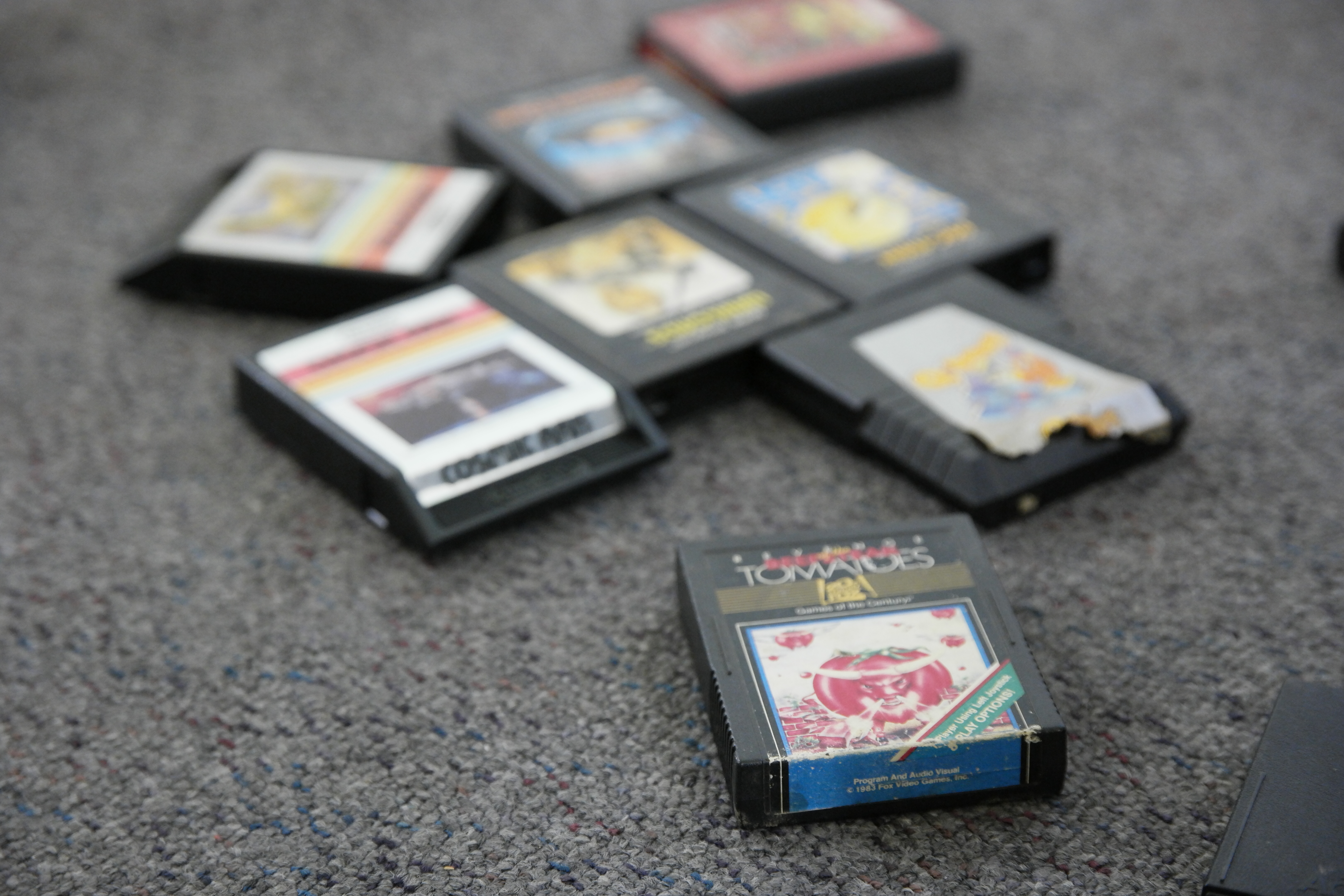 Atari 2600 cartridges